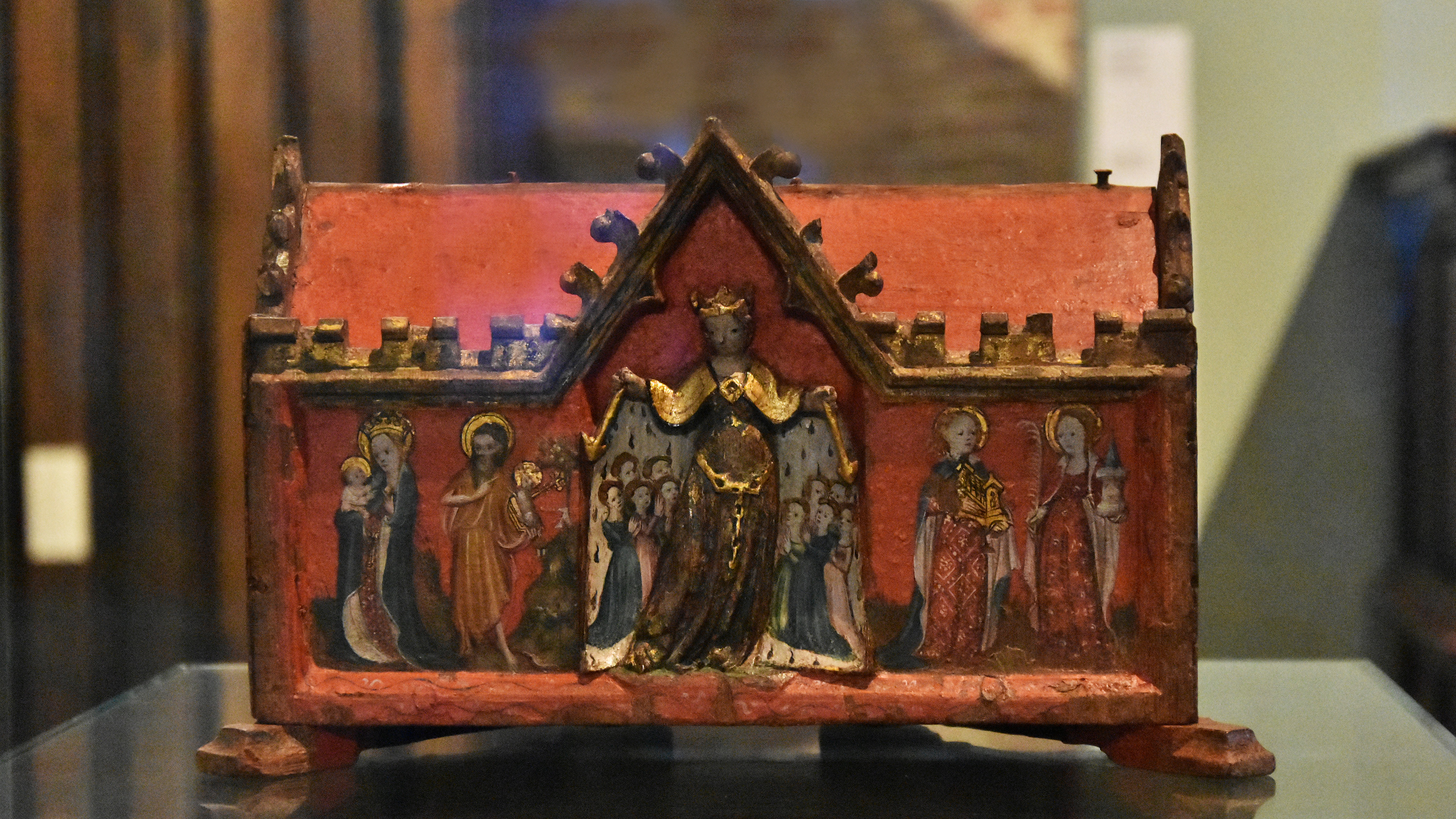 Klein Ursulaschrijn (Brugge ca.1390) Sint-Janshospitaal (Brugge) 16-08-2019 This photo of movable heritage has been taken in the Flemish Region